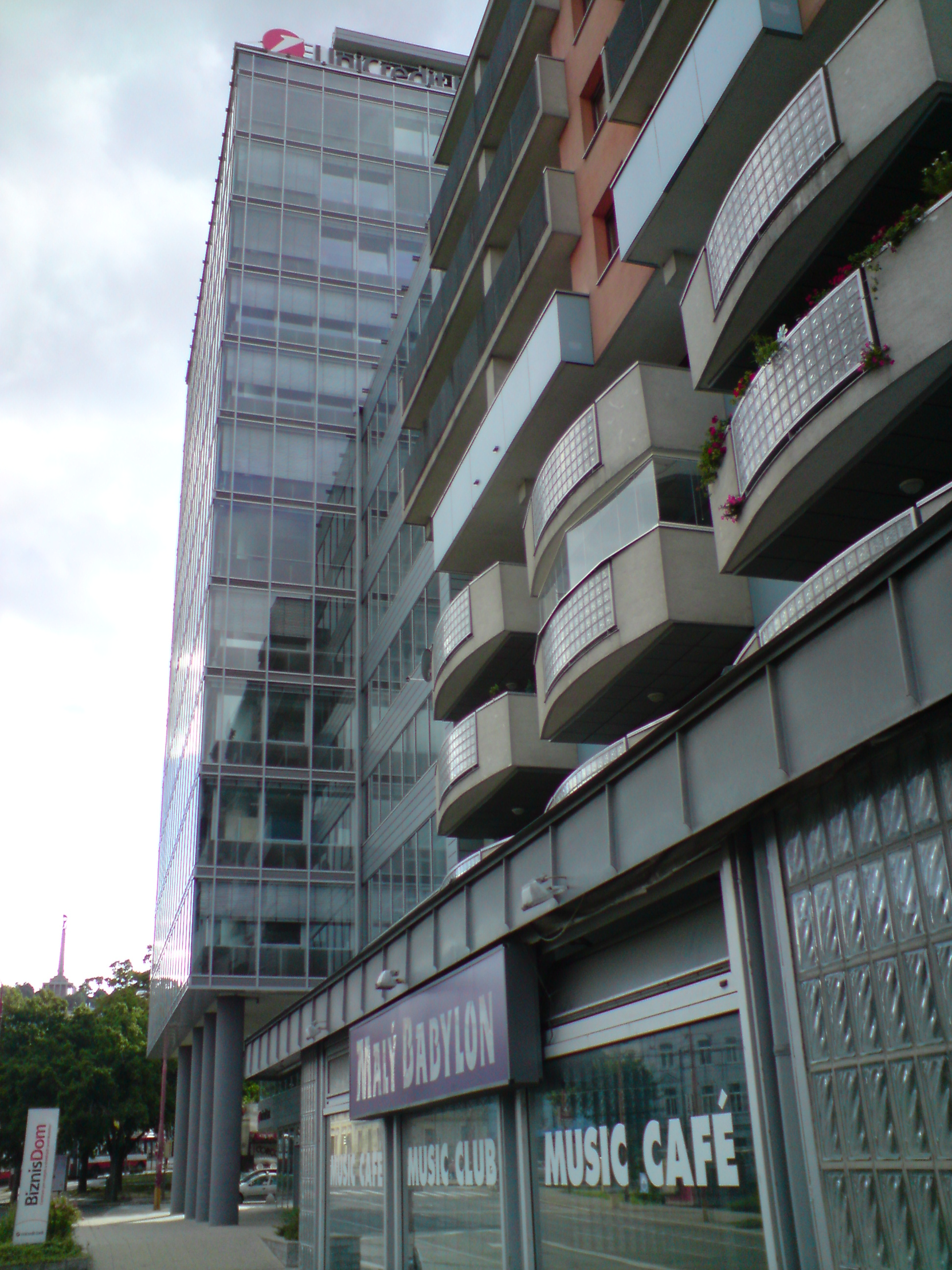 Šancová, Bratislava